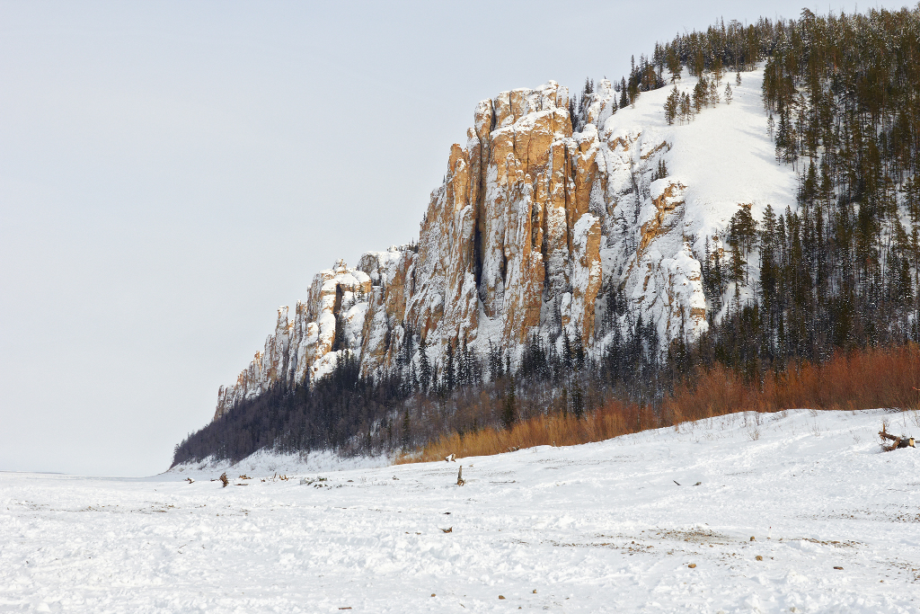 Ленские Столбы: 485,00 тысяч га в Хангаласском улусе и 868,00 тысяч га в Олекминском улусе, Олёкминский район, Якутия (Саха) This image is related to the protected area of Russia number 1410189